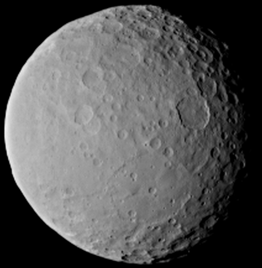 Снимок АМС Dawn карликовой планеты Цереры 19 февраля 2015 года на расстоянии 46 000 КМ